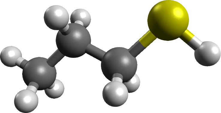 正丙硫醇分子結構的球-棍模型